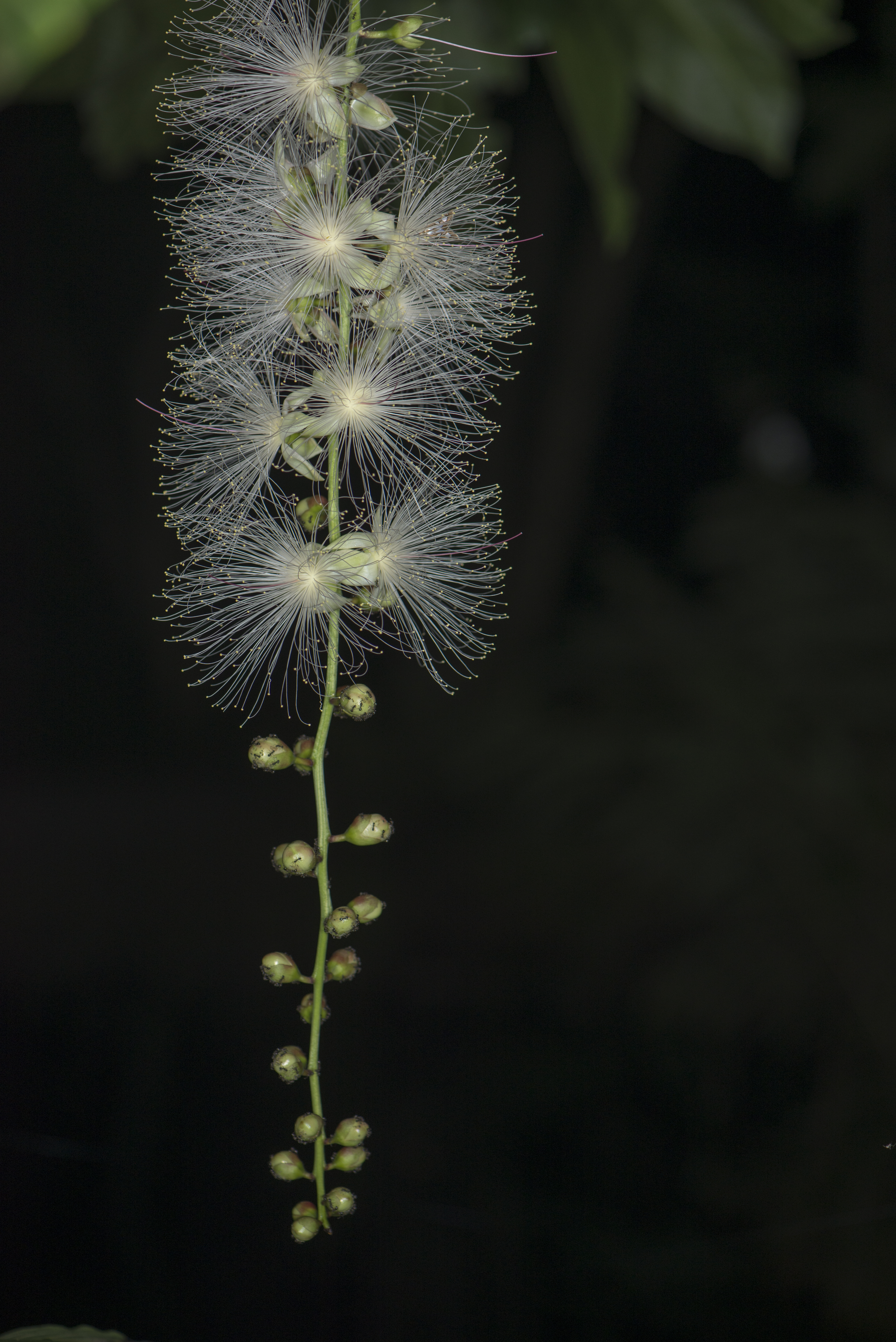 _ESI9573 Barringtonia racemosa